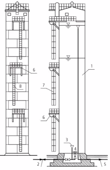 Vandentiekio kolonos schema: 1 – rezervuaras; 2 – vandens ėmimo ir tiekimo vamzdis; 3 - vandens ėmimo ir tiekimo antgalis; 4 – išleistuvas; 5 – nuotakas; 6 – tiltelis; 7 – turėklai; 8 – kopėčios.